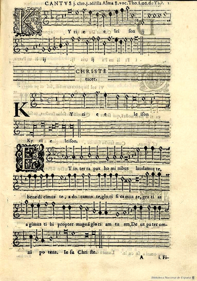 «Missa alma redemptoris», en Missae Magnificat, Motecta psalmi & alia quã plurima quæ partim octonis, alia nonis, alia duidenis vocibus concinentur, Madrid, tipografía regia, 1600. Impresor: Juan Flandro.